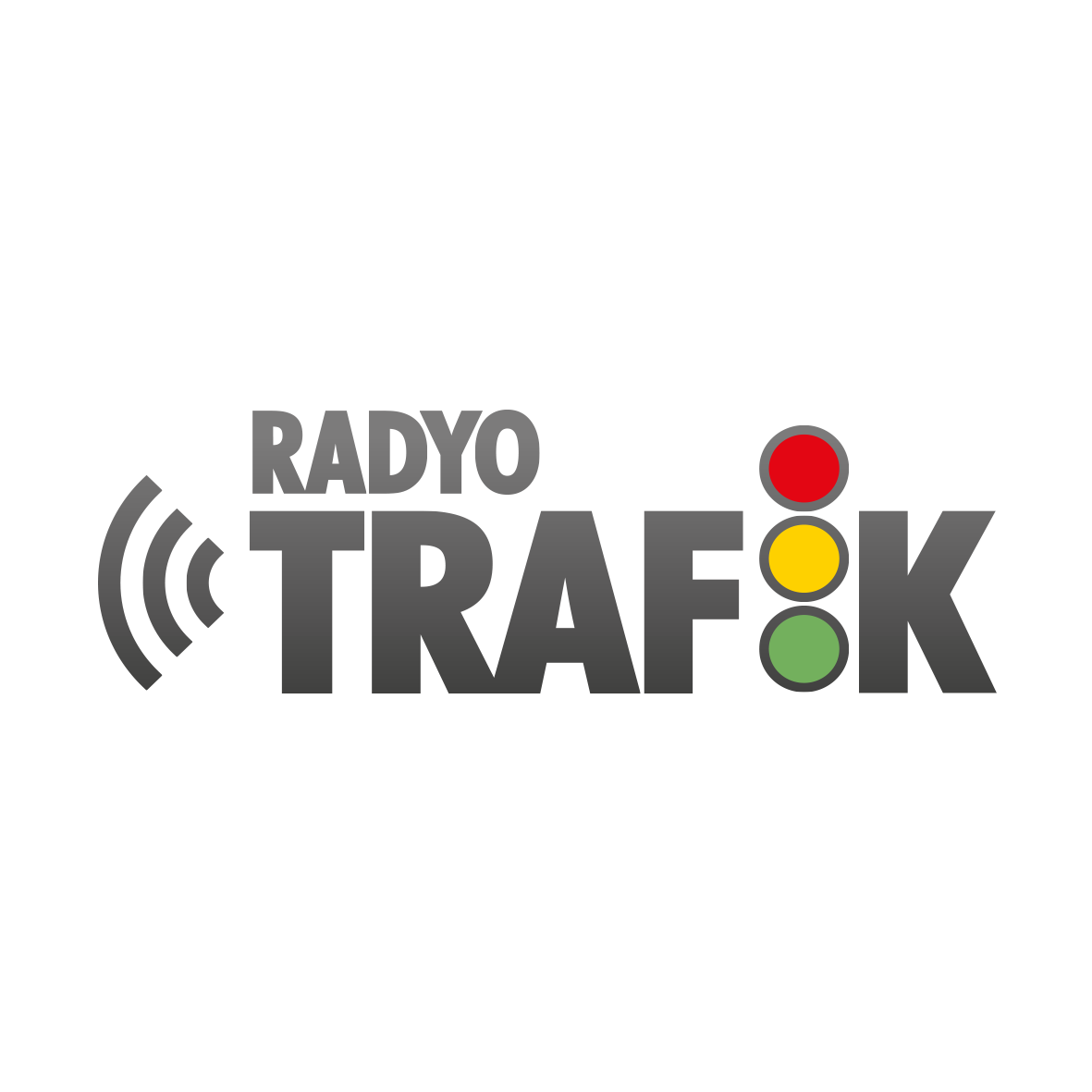 trafik logo